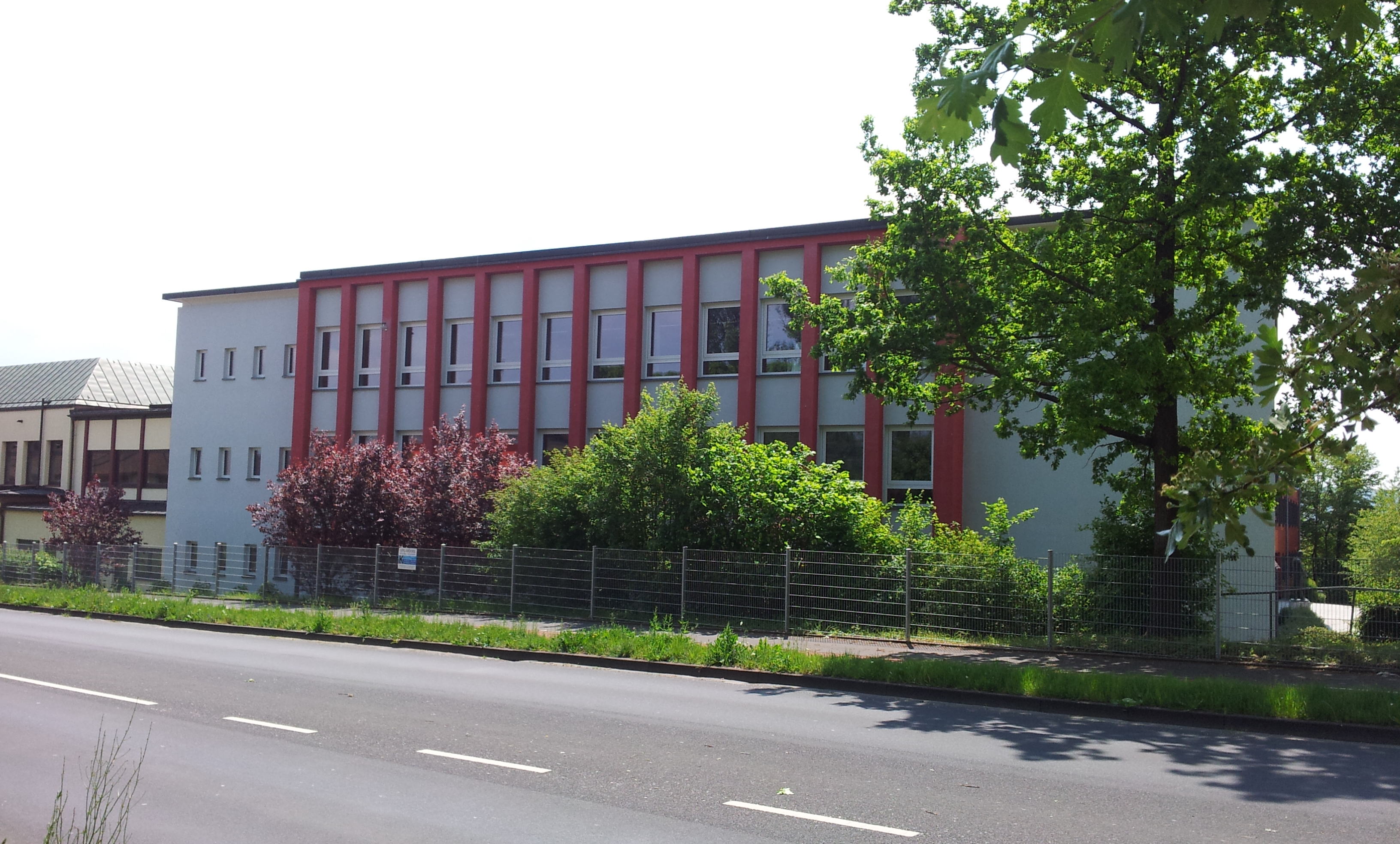 Jack-Steinberger-Gymnasium in Bad Kissingen (2020)